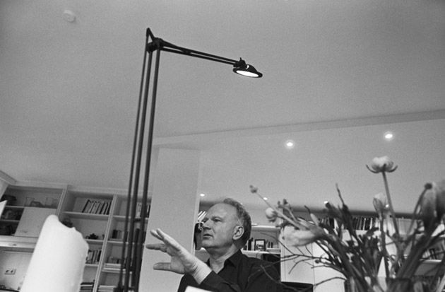 Ulrich Beck am 08. März 1999 in seiner Wohnung in München